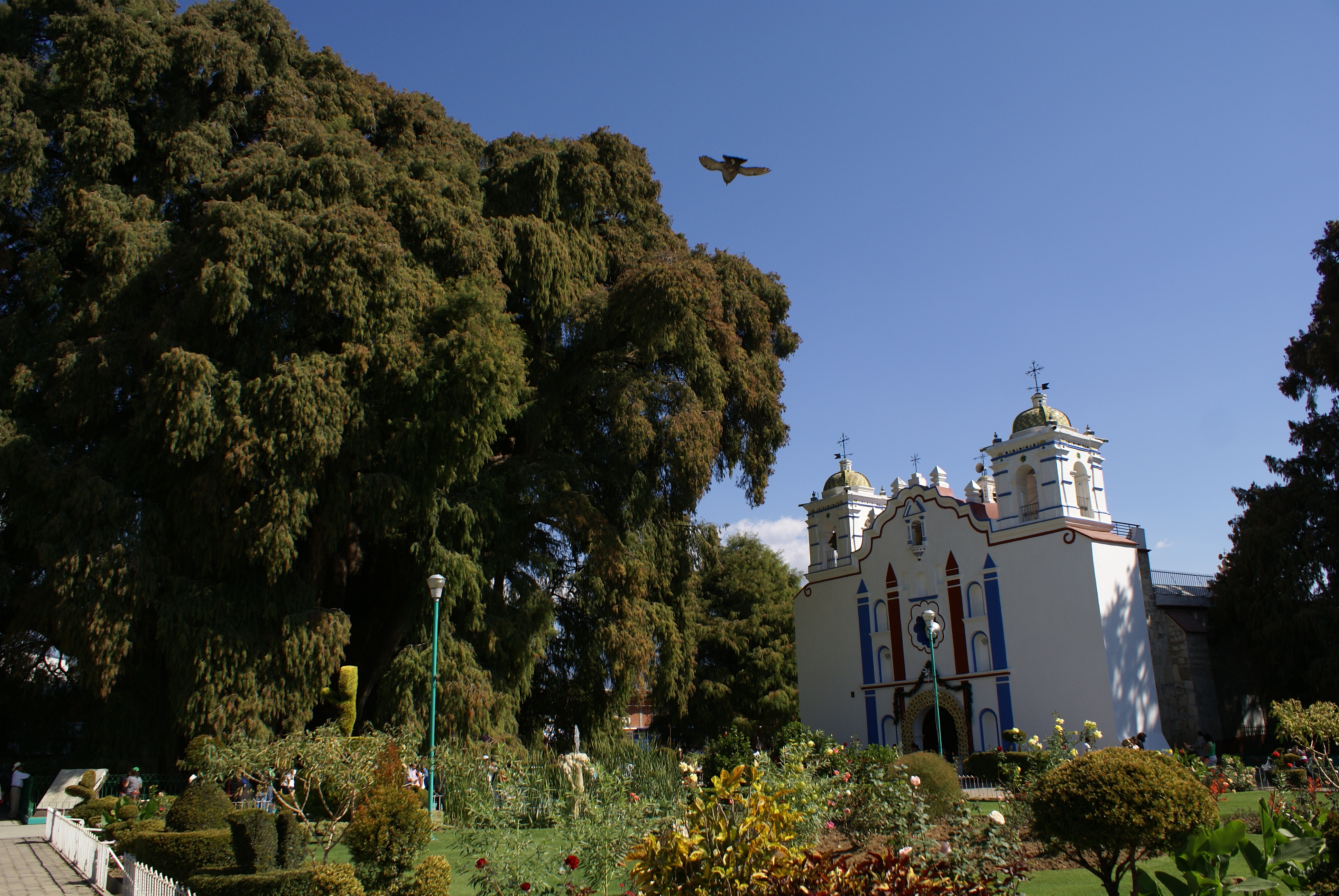 Árbol del Tule e iglesia de Santa María del Tule, Oaxaca, México.